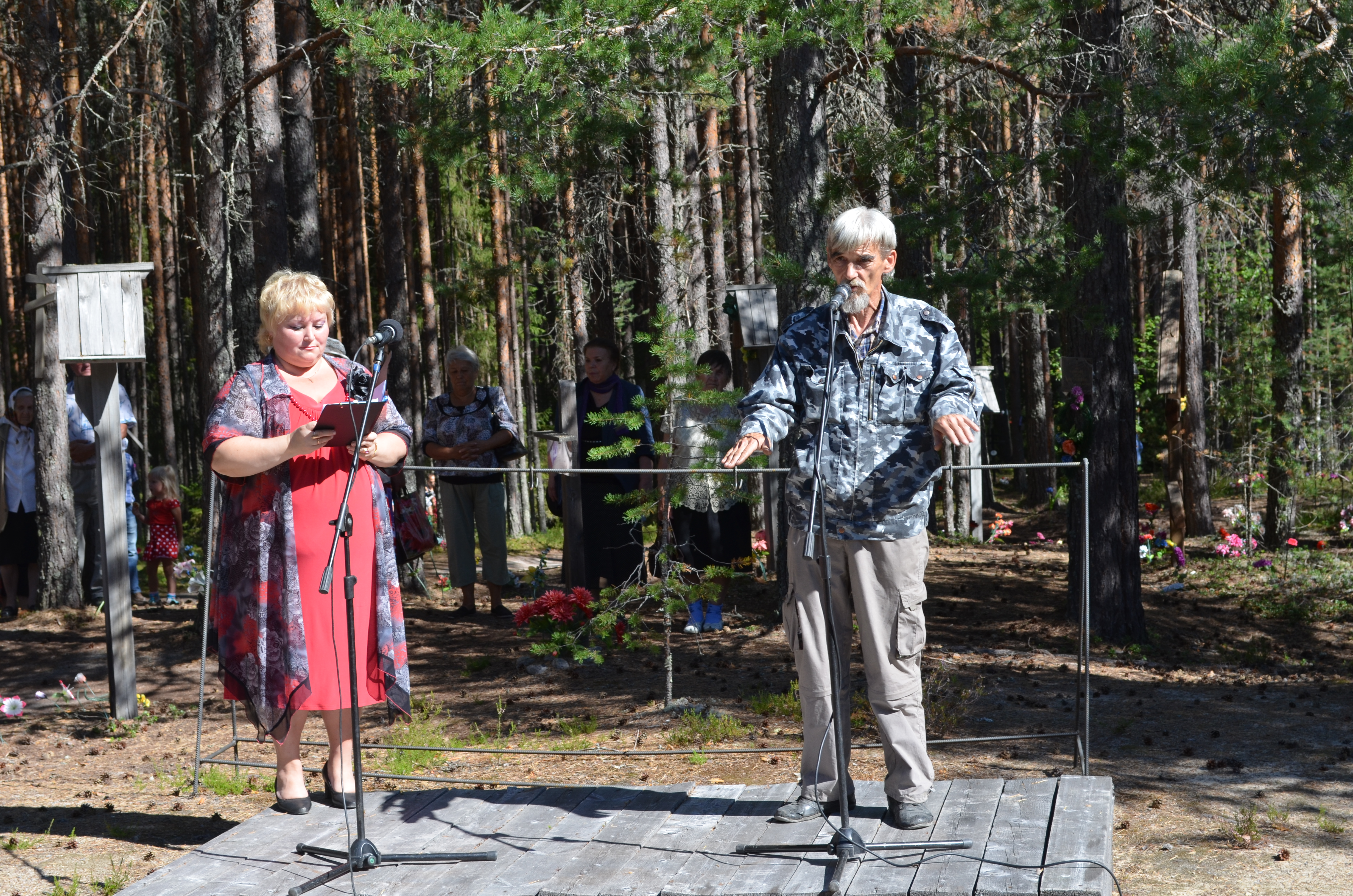 Урочище Сандармох. Дні пам’яті. Юрій Дмитрієв